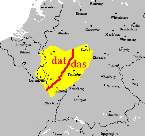 Deutschlandkarte mit eingezeichneter das-dat-Linie (eine Sprachgrenze)